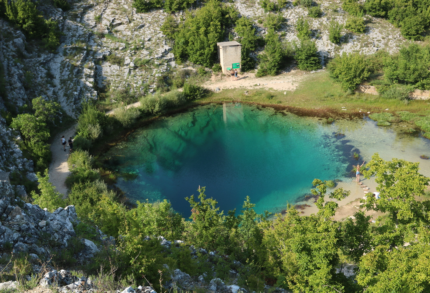 Vrelo Cetine1